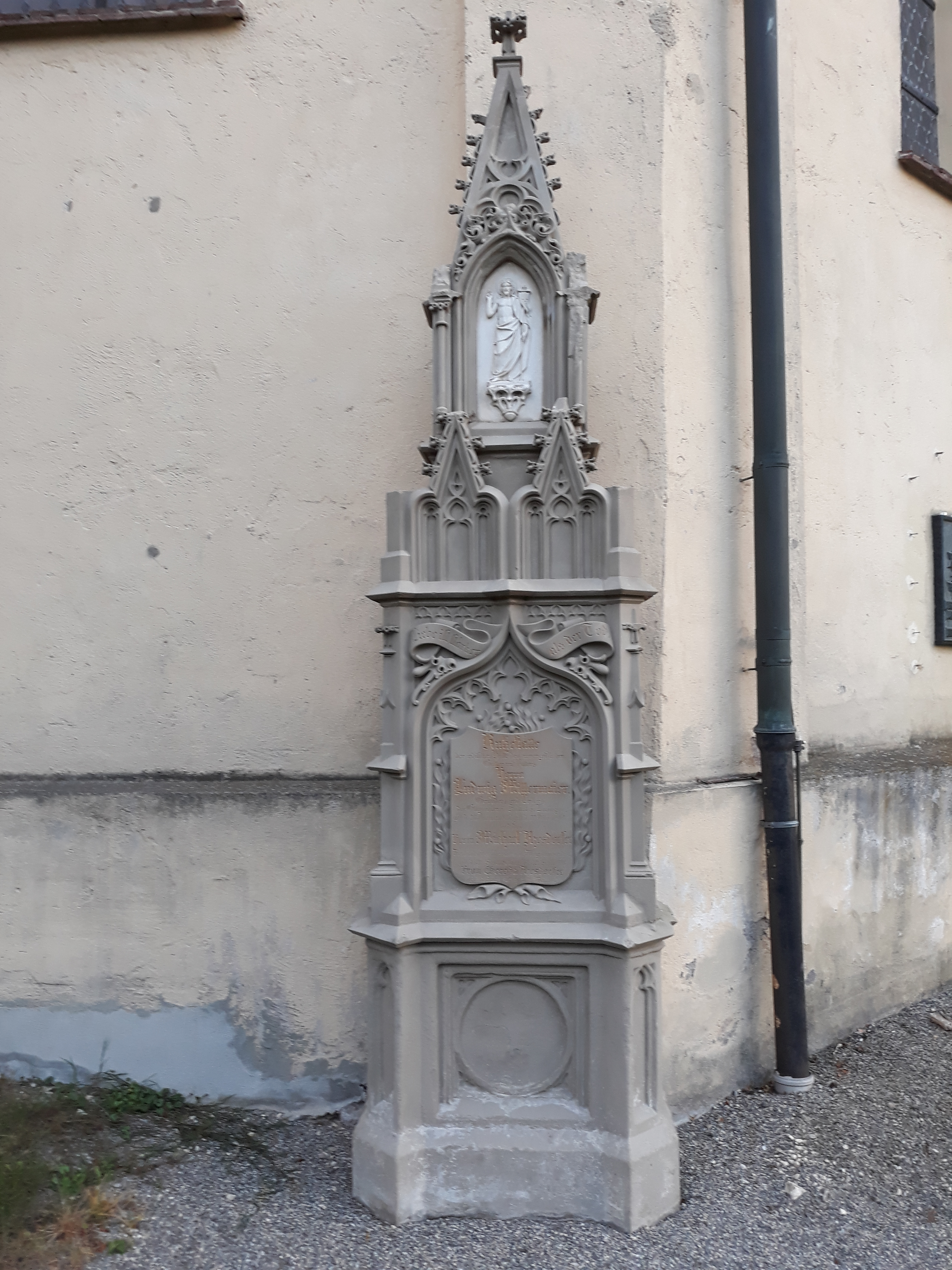 Das Grab des deutschen Glaskünstlers Ludwig Mittermaier auf dem Alten Friedhof Lauingen.